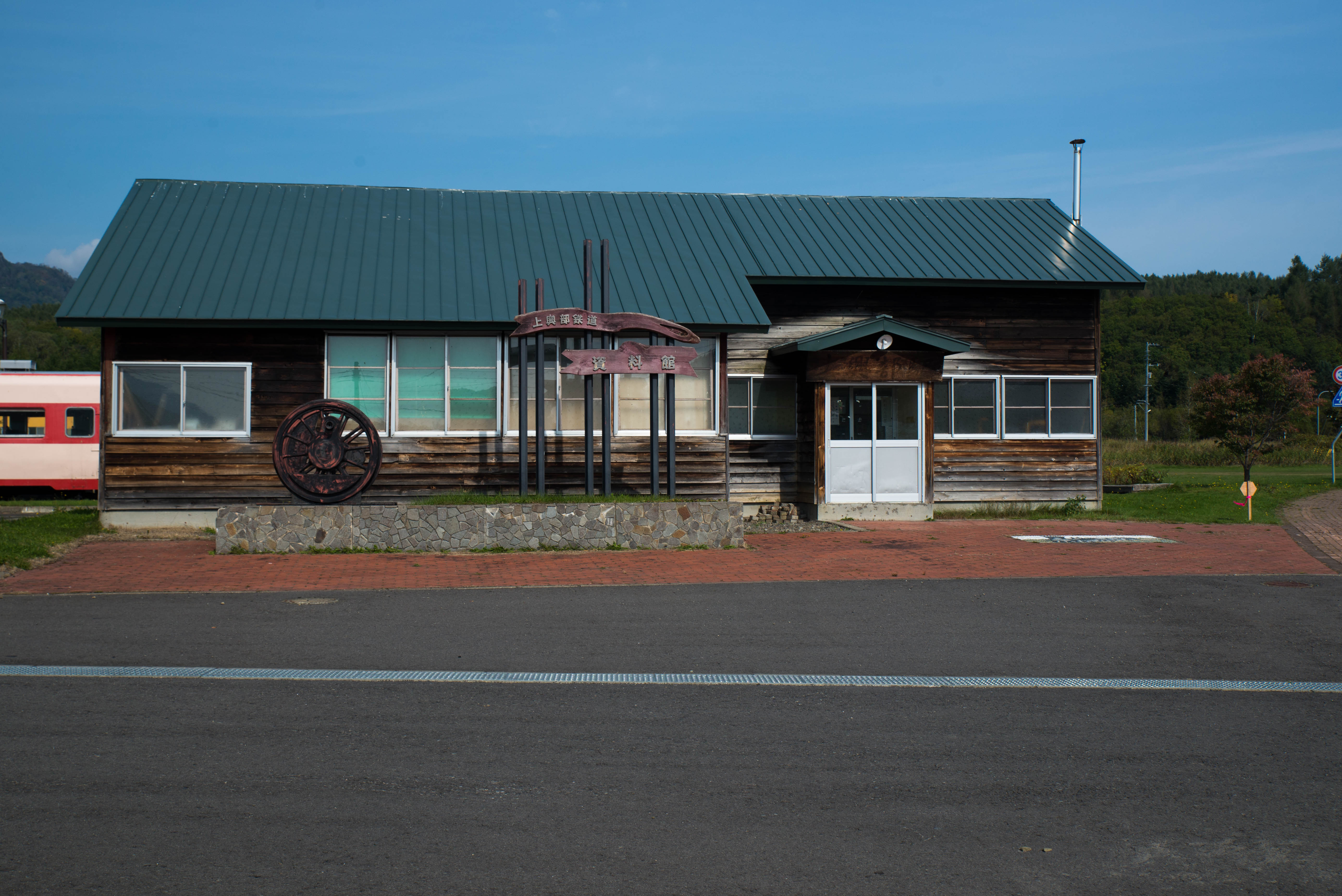 北海道旅客鉄道株式会社名寄本線上興部駅廃駅跡地